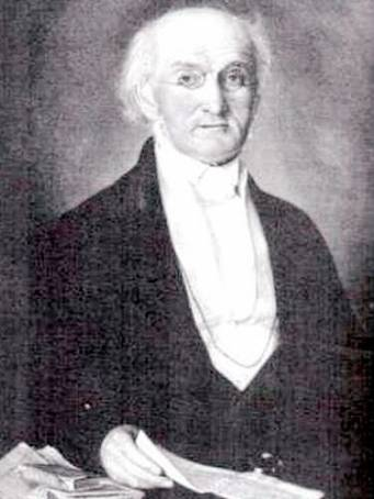 Faustin Ens (1782 - 1858), Český topograf a pedagog.